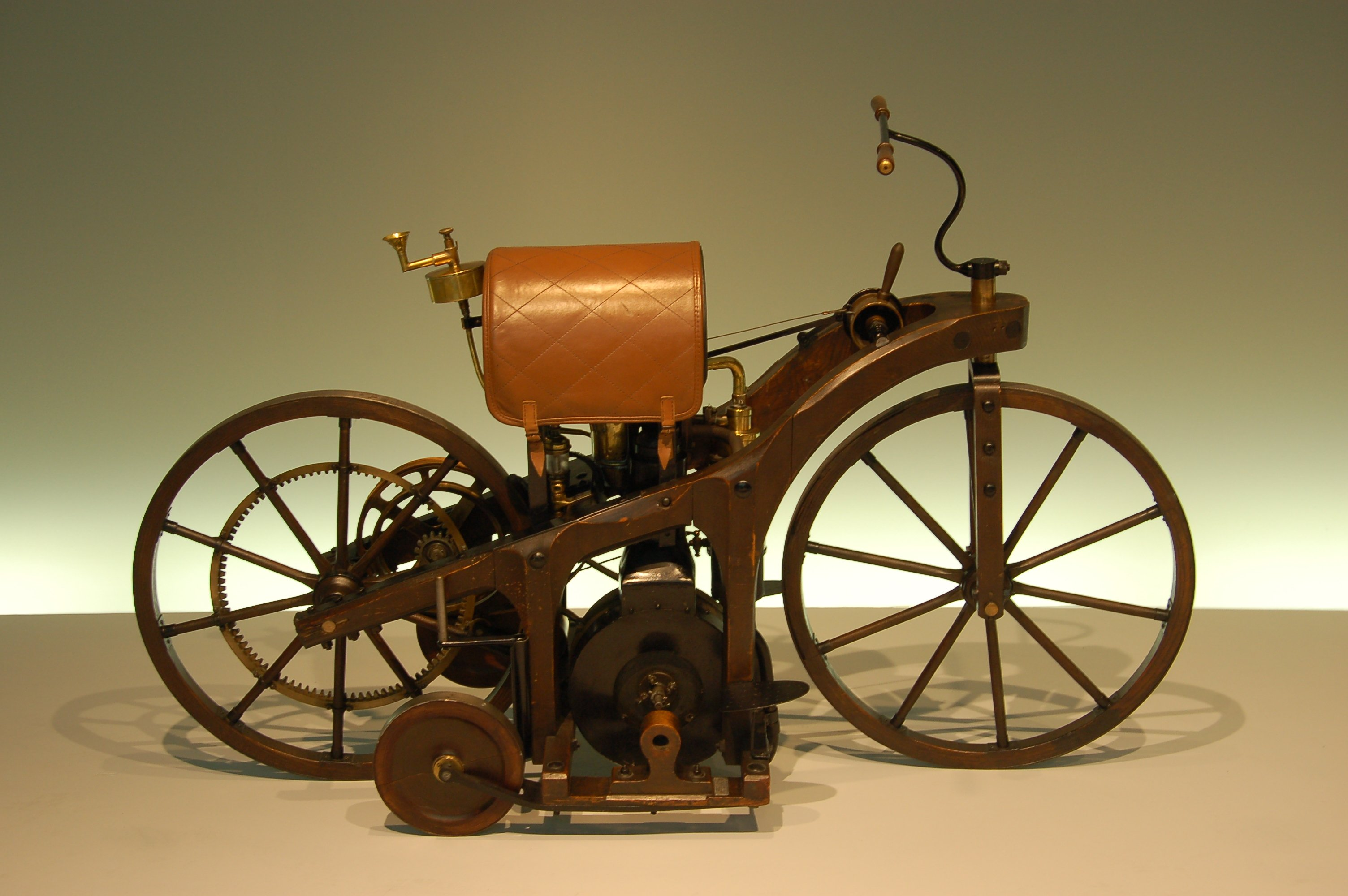 Daimler Reitwagen aus dem Jahr 1885 im Mercedes Benz Museum in Stuttgart